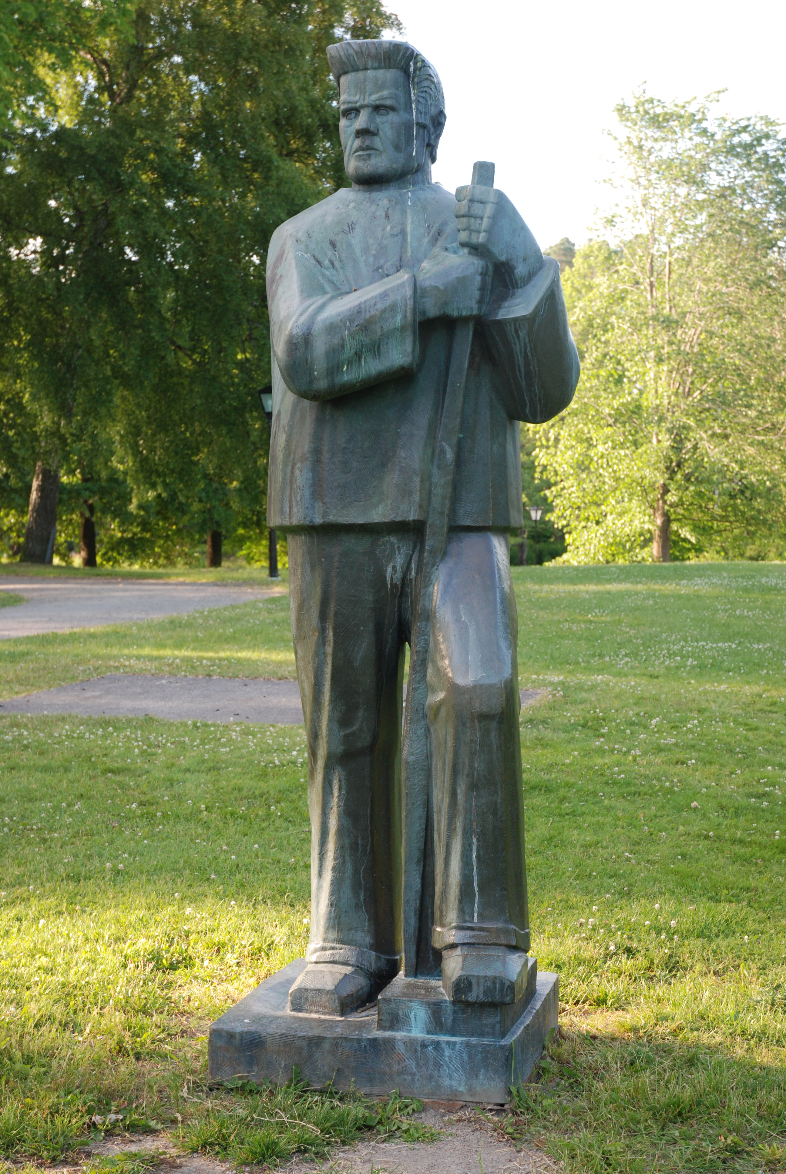 Sten Dahlström´s Smältsmeden, bronze, 1965, Bruksparken, Finspång, Sweden